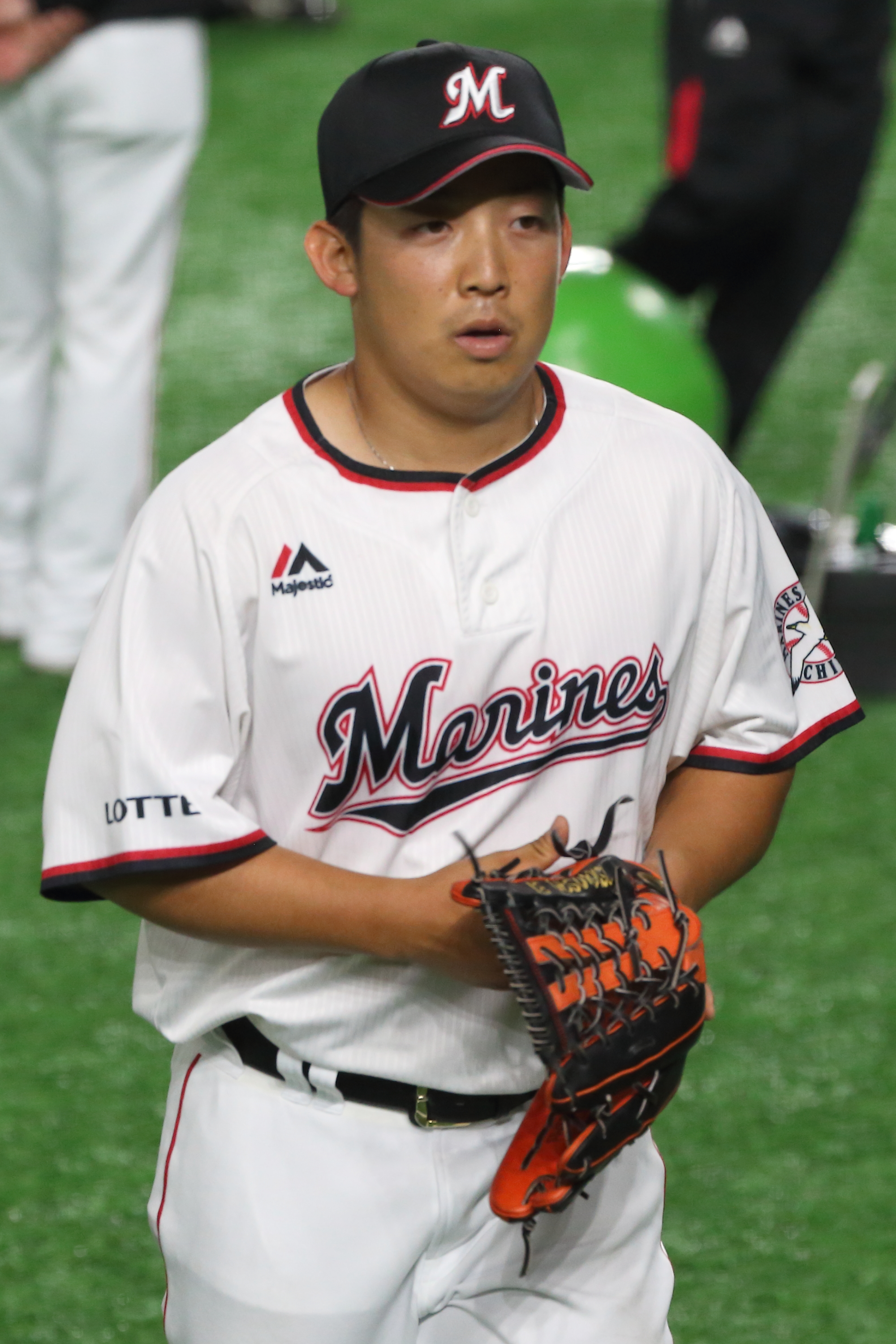 千葉ロッテマリーンズの菅野剛士選手。2019年6月7日、東京ドームで撮影。